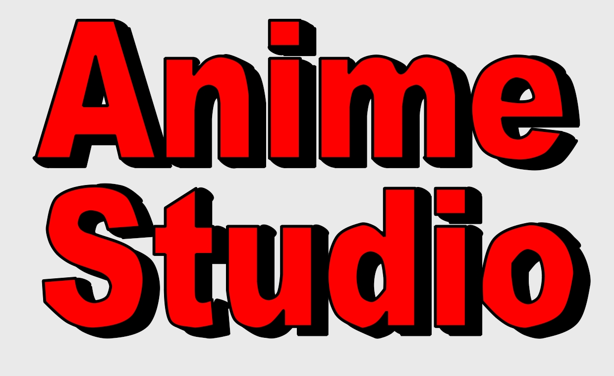 Dreidimensionaler, roter Schriftzug "Anime Studio", mit Anime Studio erstellt